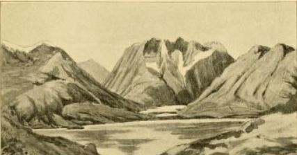 Le lac d'Amitsuarssuk, domaine de Foss, Vatnahverfi.